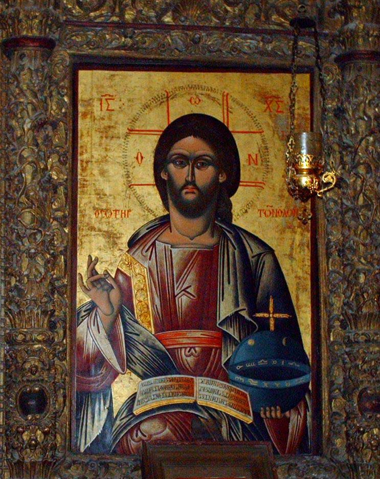 Christus-Ikone (18. Jhdt.). Teil d. Ikonostase in der Marienkirche in Labova e Kryqit (Albanien)